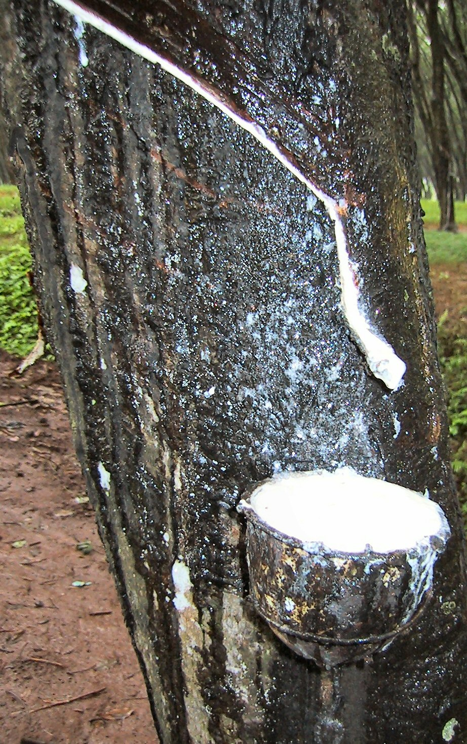 Rubberproductie uit boom